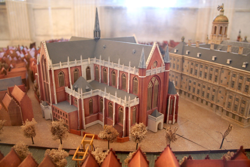 Maquette Nieuwe Kerk, zijde Nieuwezijds Voorburgwal. Geëxposeerd in het Paleis op de Dam; 2005. Foto: Erik Swierstra.